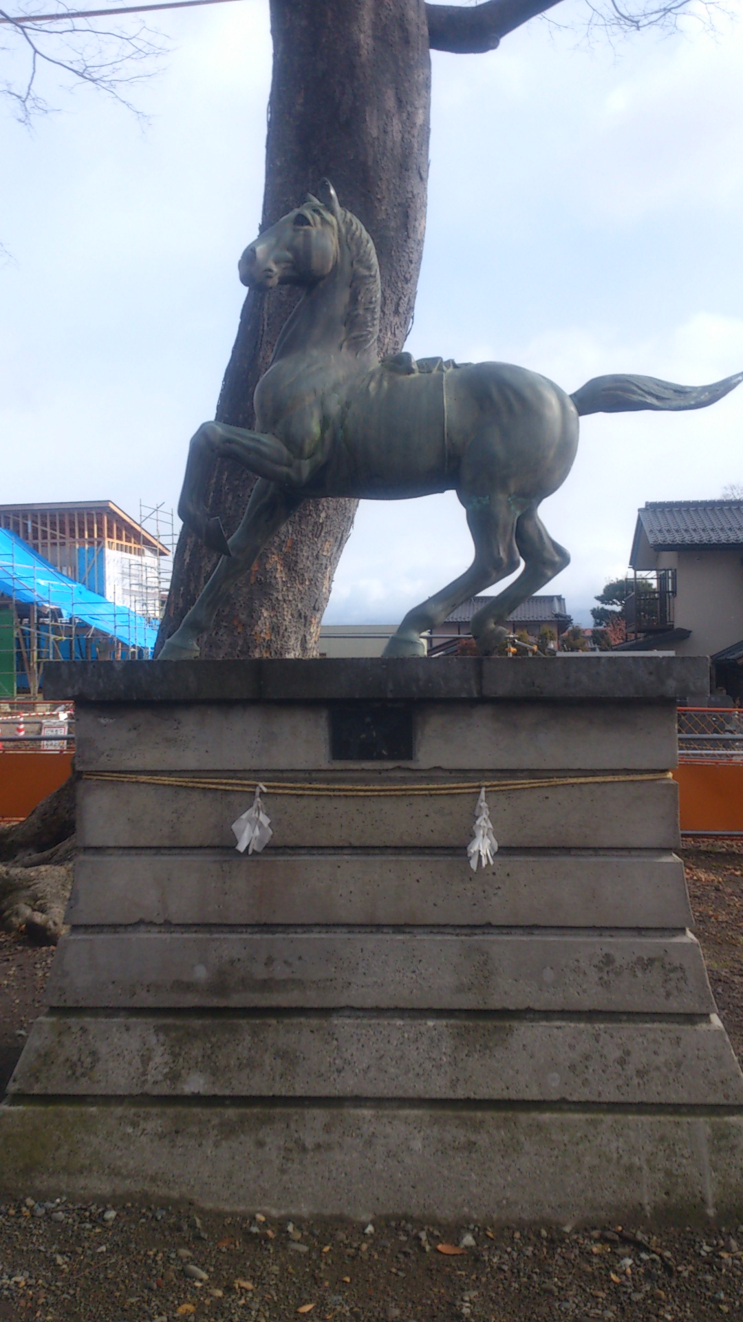 桐原牧神社の神馬像（長野県長野市桐原二丁目）